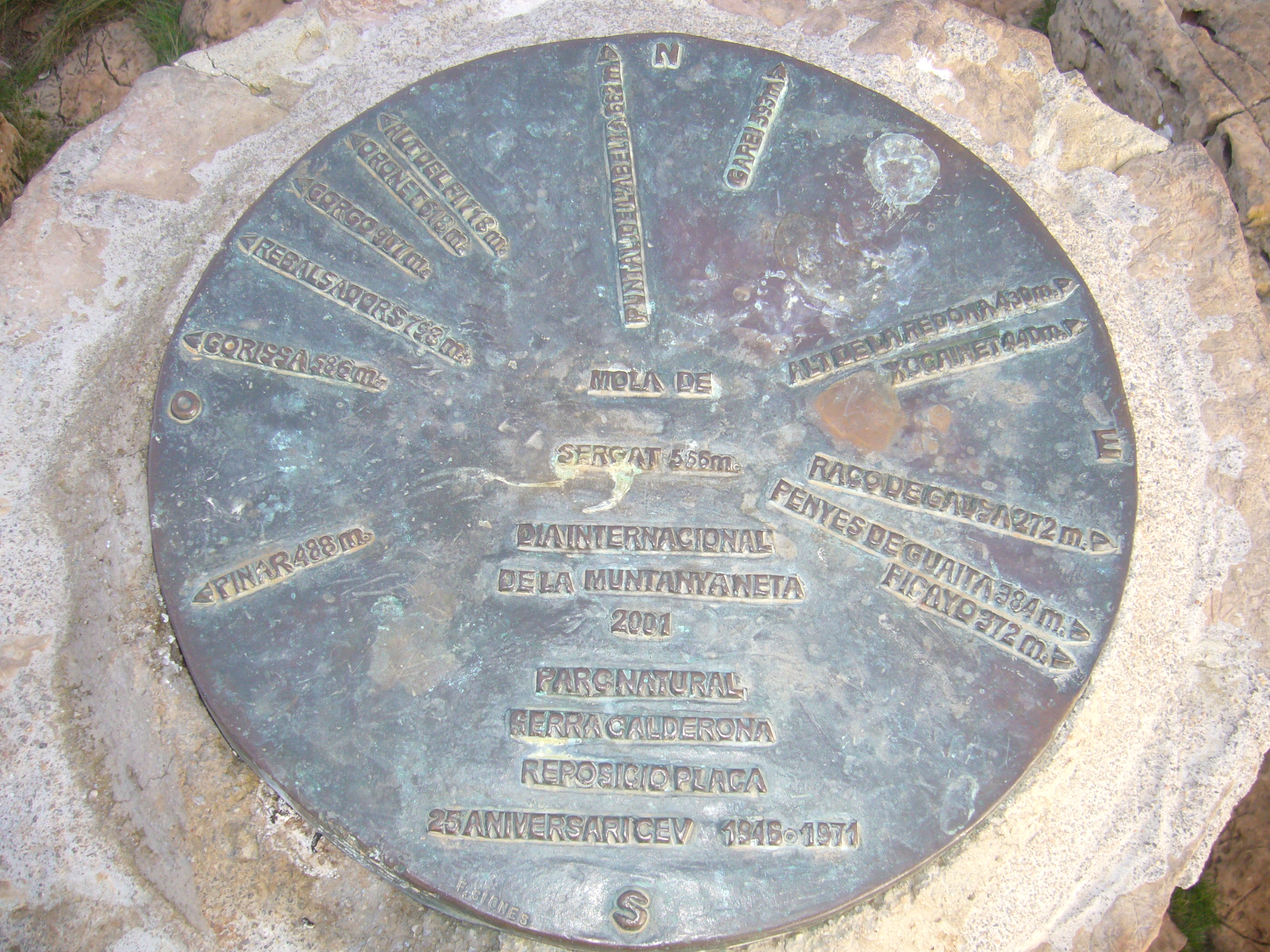 Mola de Segart, plànols dels cims que des d'allà s'albiren